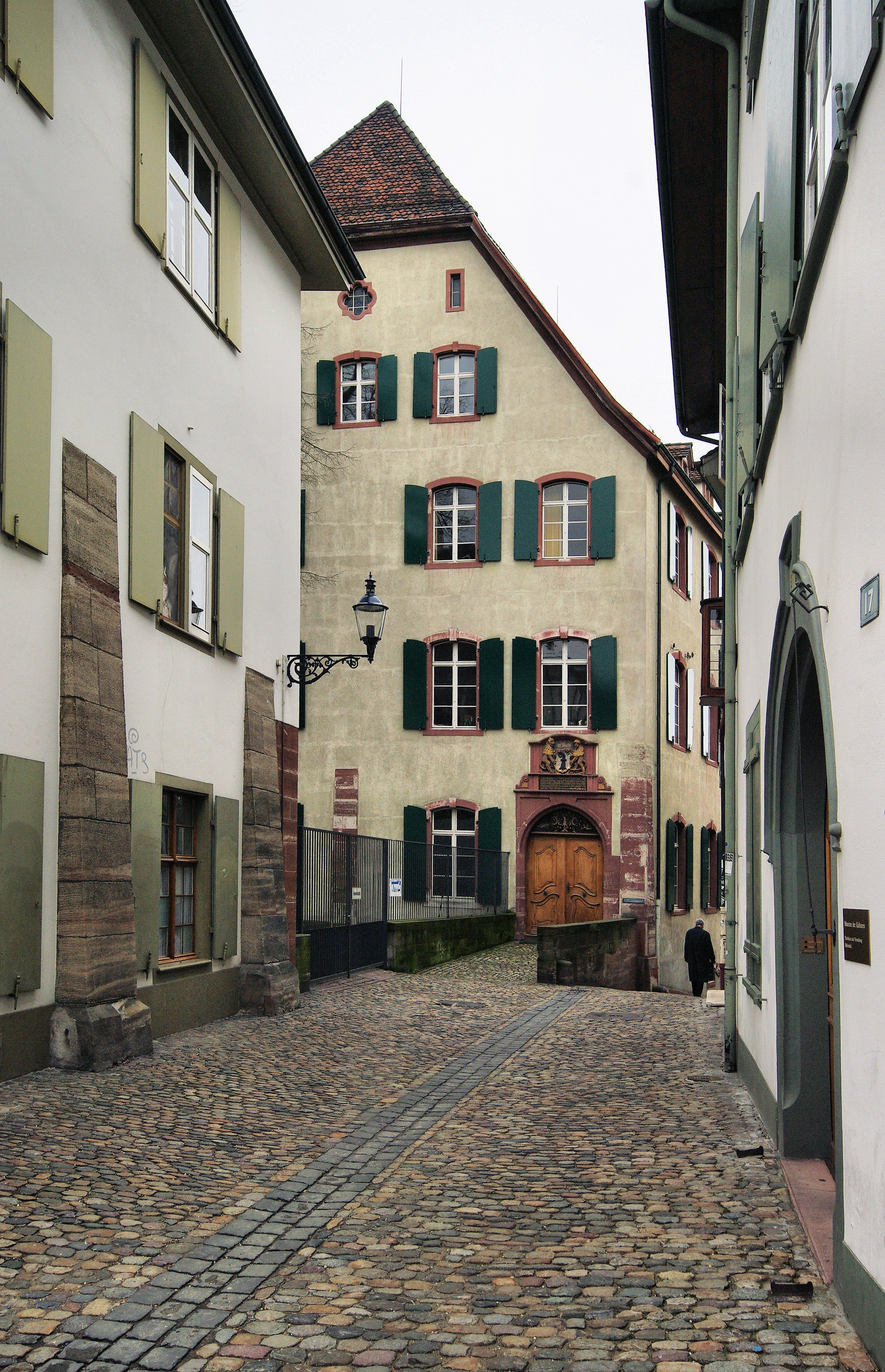 Bilder aus Basel auf dem Weg zum Wikipediatreffen am 28.03.09 Haus "zur Mücke"